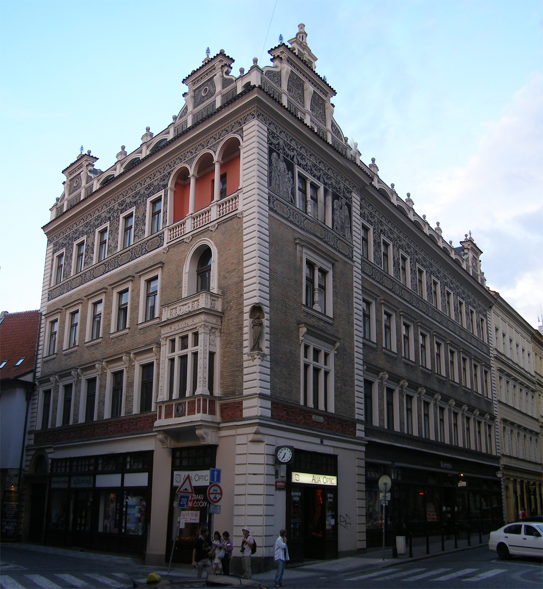 Městský dům U Bechyňů (Staré Město), Praha 1-Staré Město, Jilská 527/2, Skořepka 527/1.